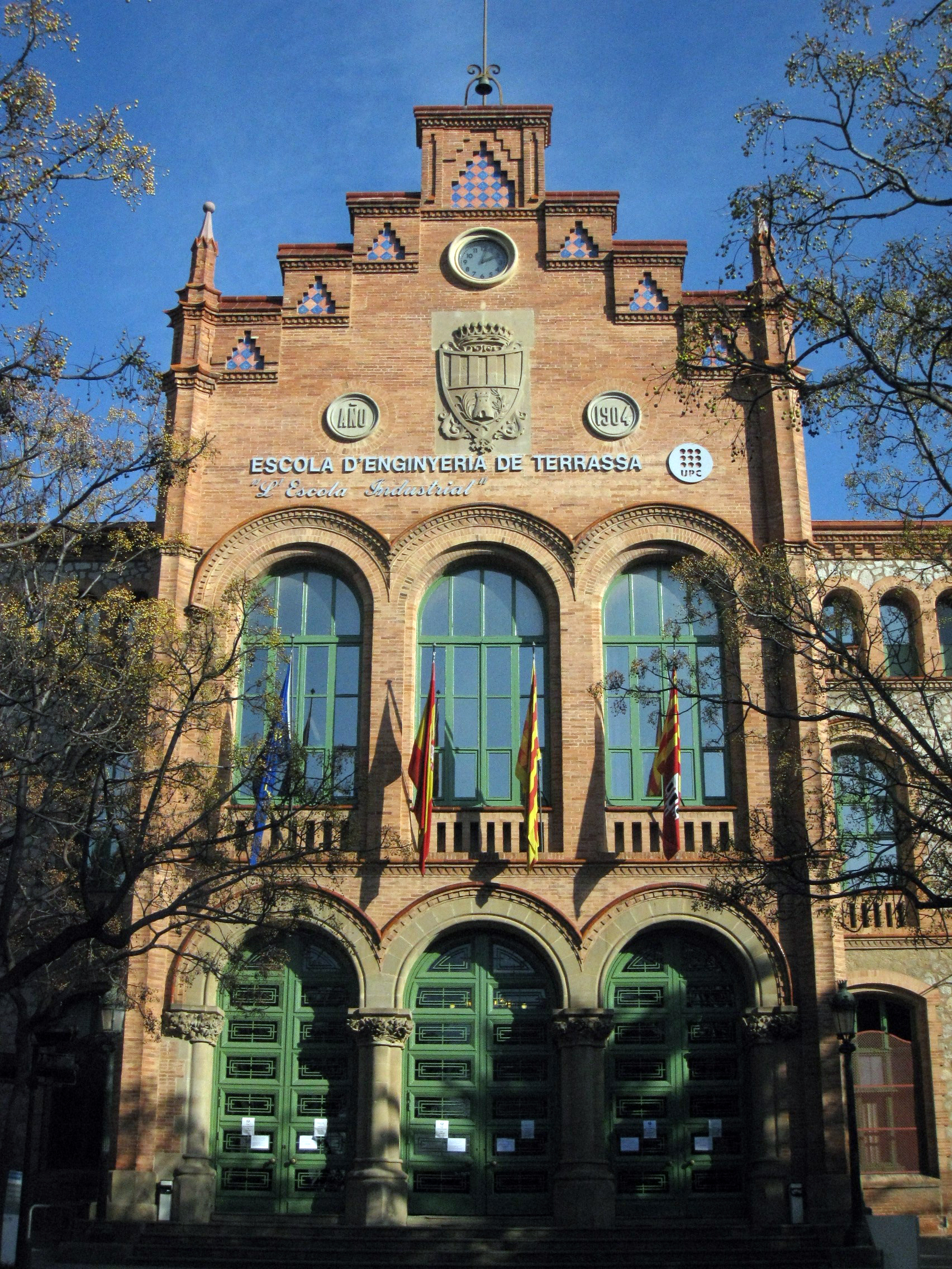 Escola Industrial, actualment Escola d'Enginyeria de Terrassa (UPC). Edifici modernista de Lluís Muncunill (1902-04).